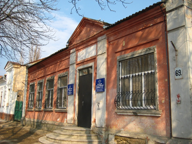 Бывший дом Хаима Горштейна